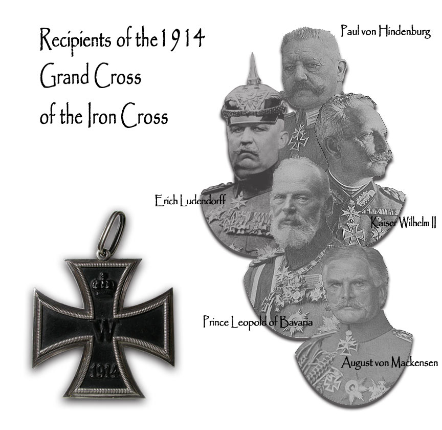 Erste Empfänger des Großkreuzes zum Eisernen Kreuz von 1914